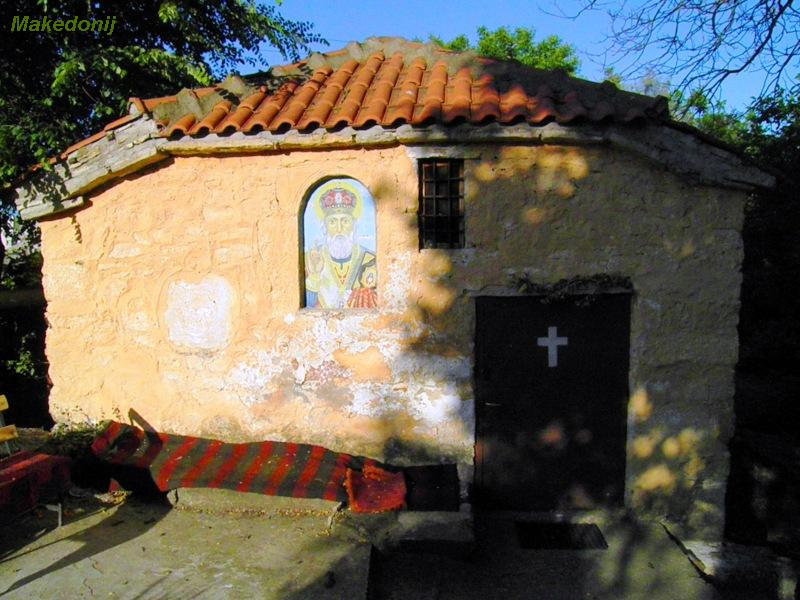 Цркава Св. Никола во Крупиште